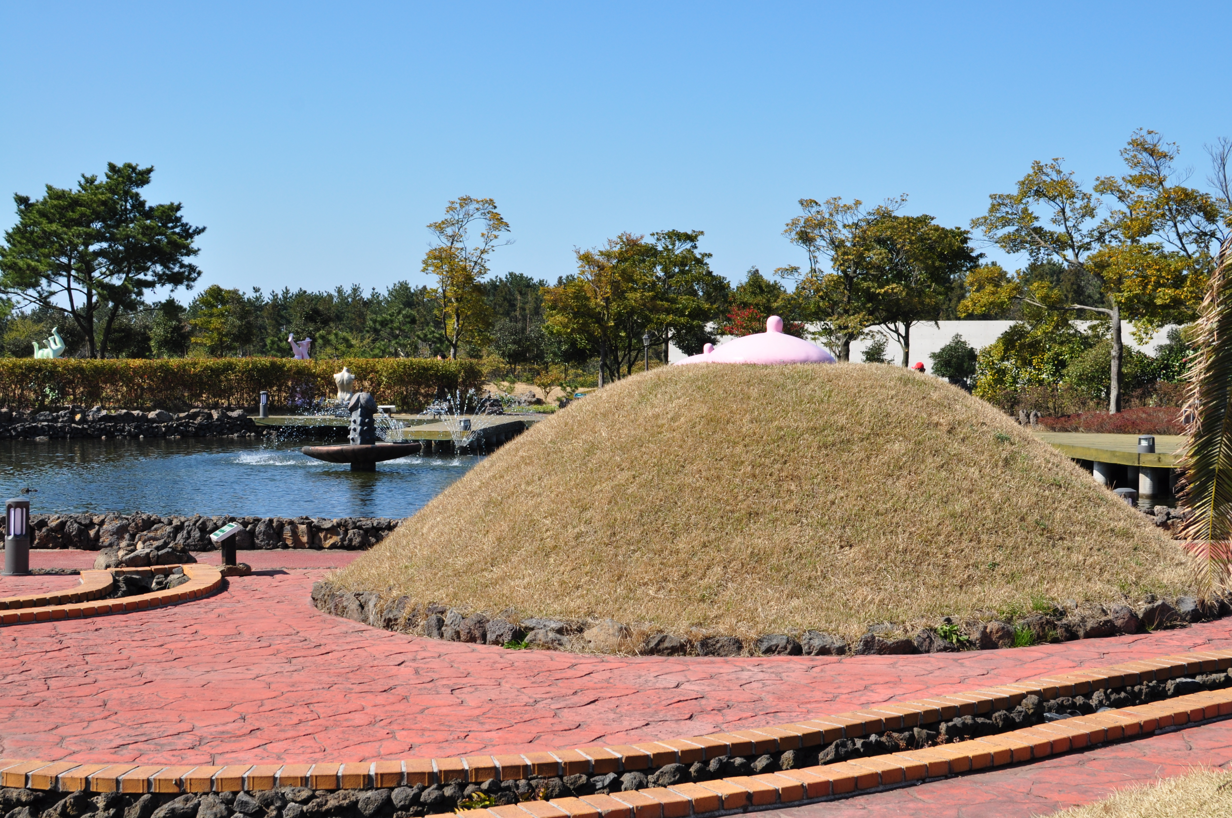 Teta a Loveland